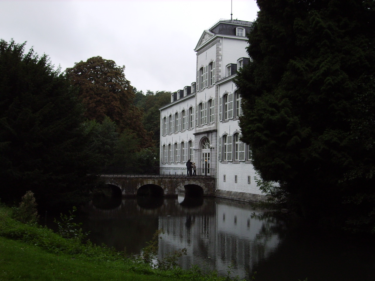 Alte Schlosseinfahrt von Schloss Rahe in Aachen Laurensberg. Heute ein Nebeneingang. Eigene Aufnahme am Tag des Denkmals 12. September 2010.